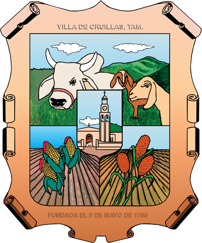 Stemma Cruillas - Tamaulipas